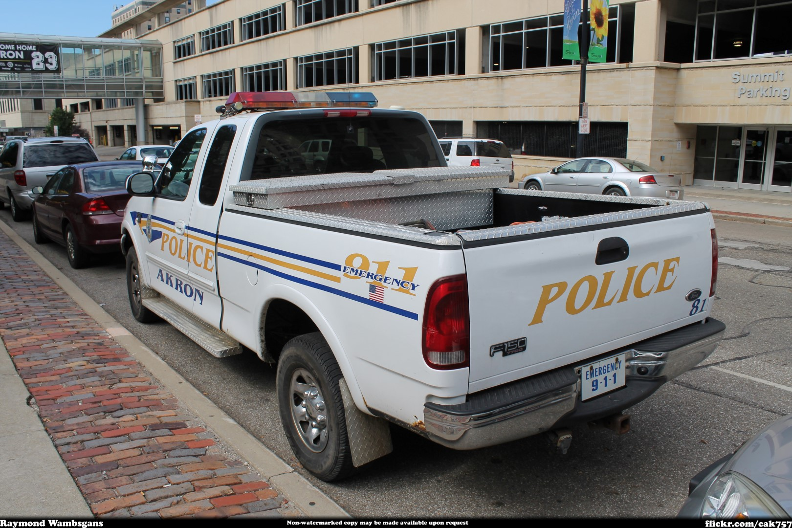 APD Ford F-150 #81